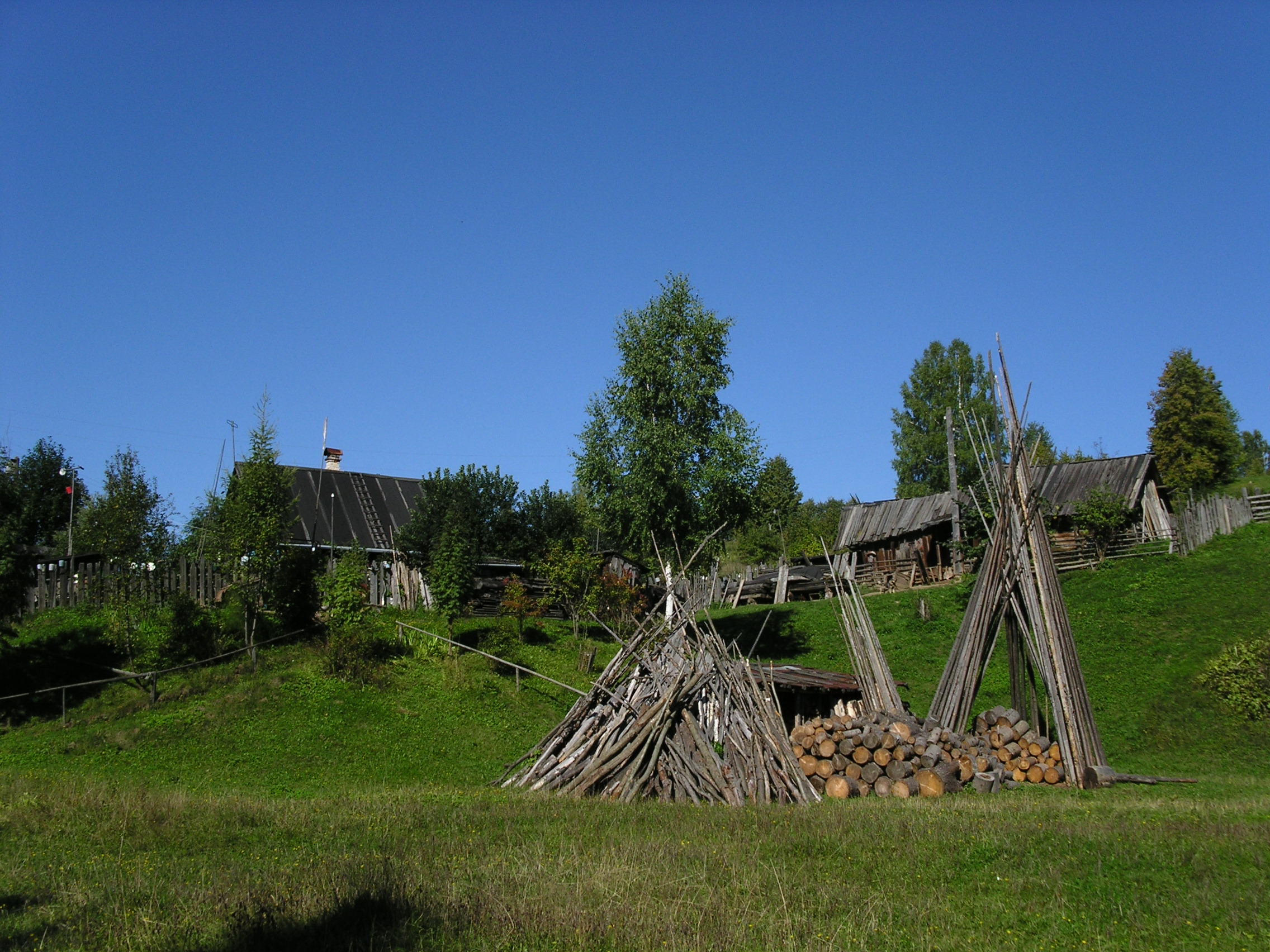 Bykovka village outskirts. Perm Region. Околица деревни Быковка. Пермский край